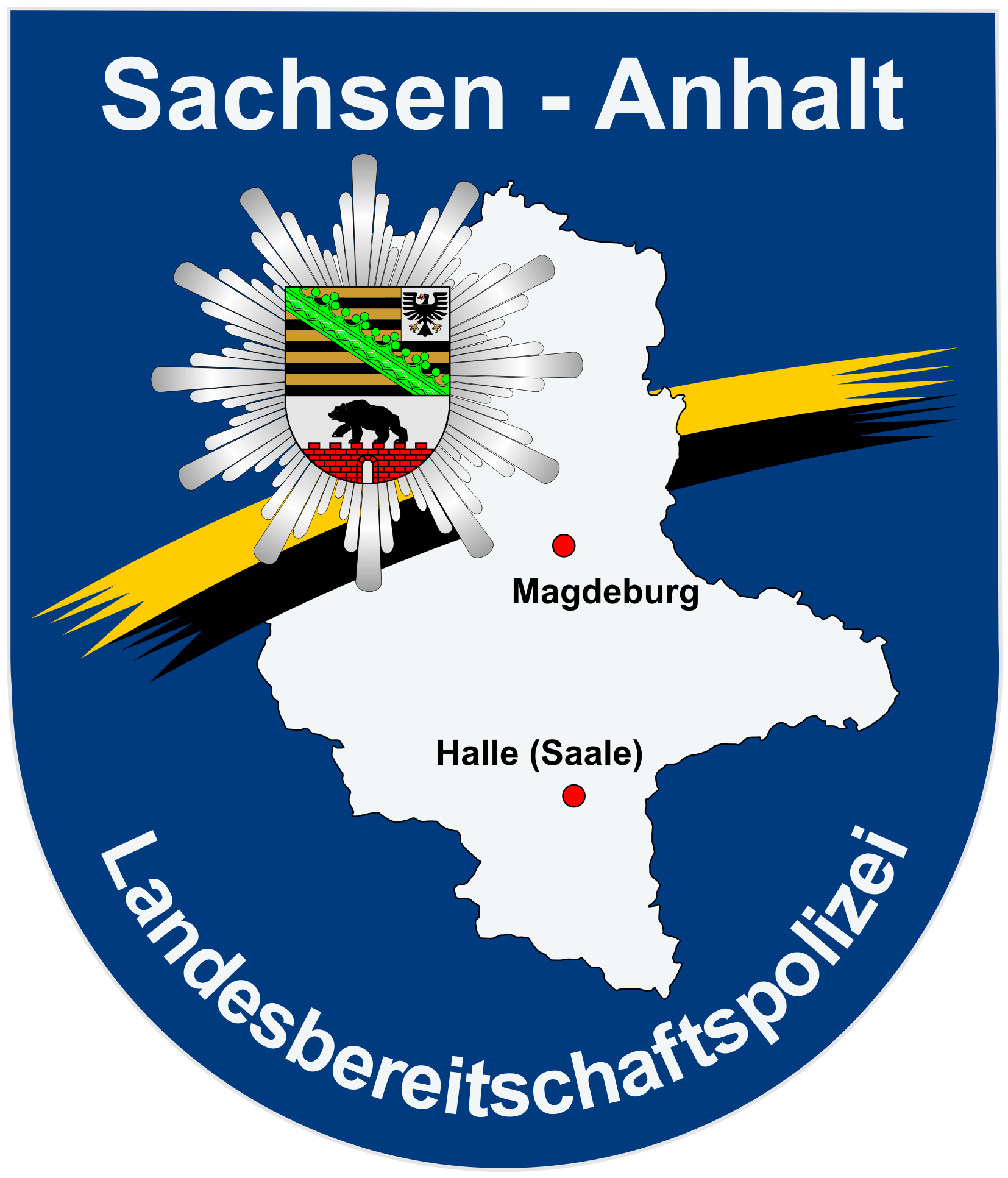 Verbandsabzeichen (Vers. 2016) dürfen an der Uniform getragen werden. Sie ersetzen aber nicht das Landeswappen an der Uniform oder stellen ein offizielles Logo der Dienststelle dar.